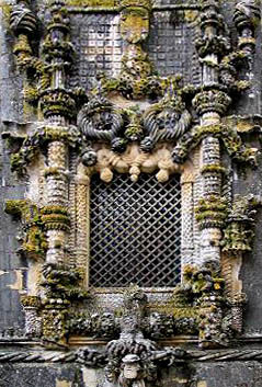 Fenêtre ouest du "Convento do Cristo" à Tomar